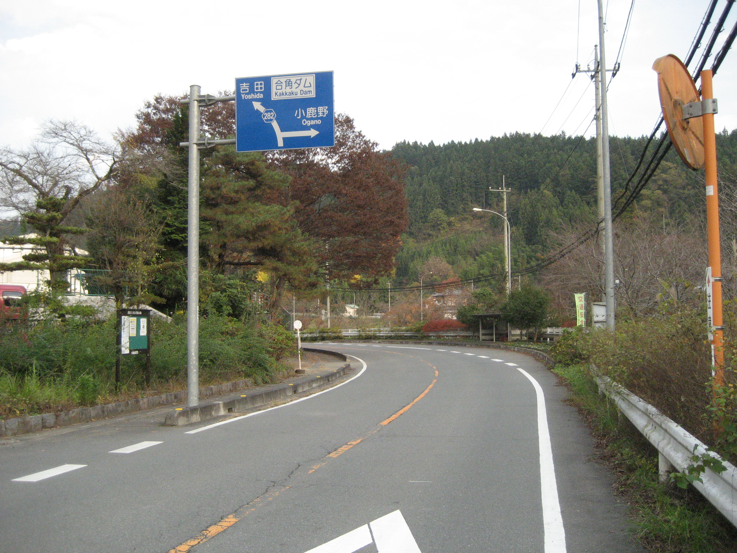 埼玉県道282号線小鹿野町内